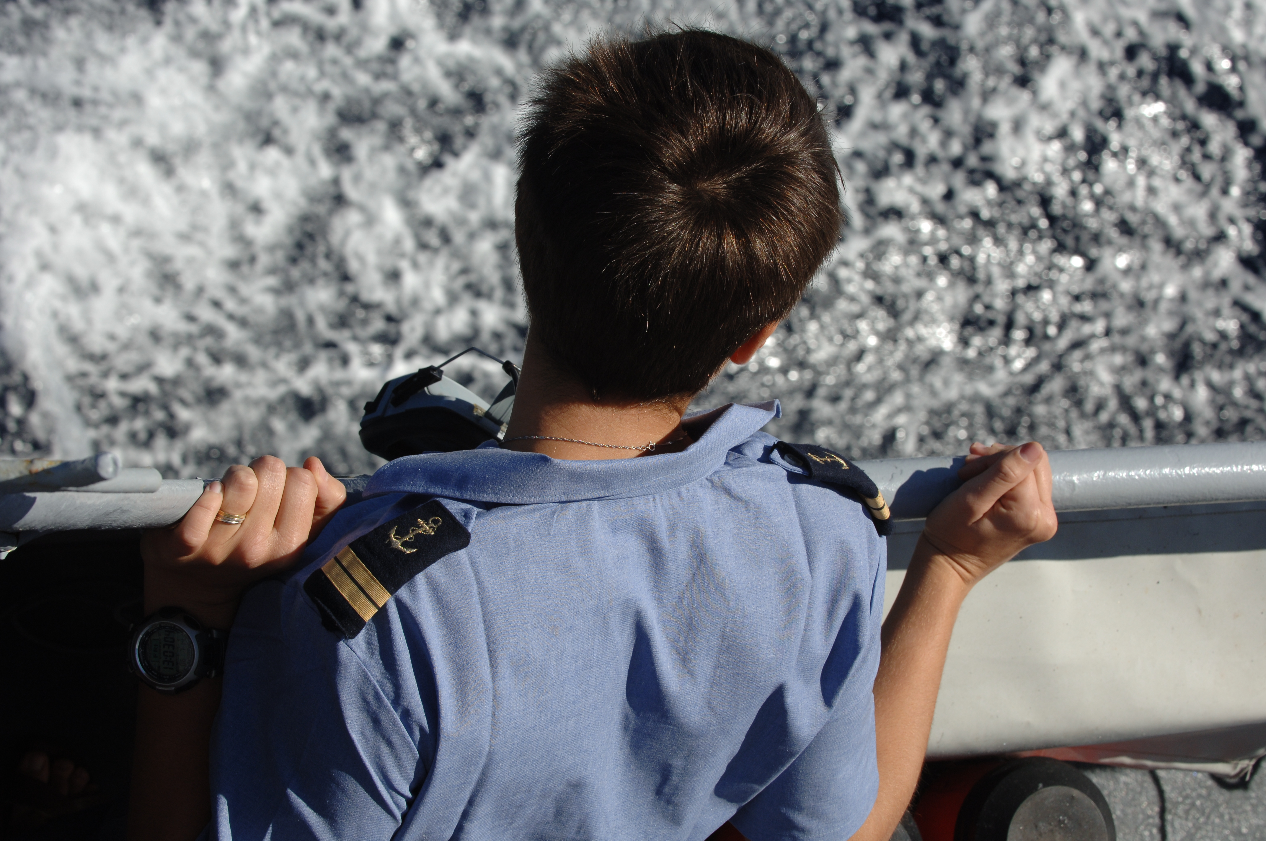 Un enseigne de vaisseau de première classe surveille le poste de manoeuvre depuis les ailerons du Patrouilleur austral Albatros.